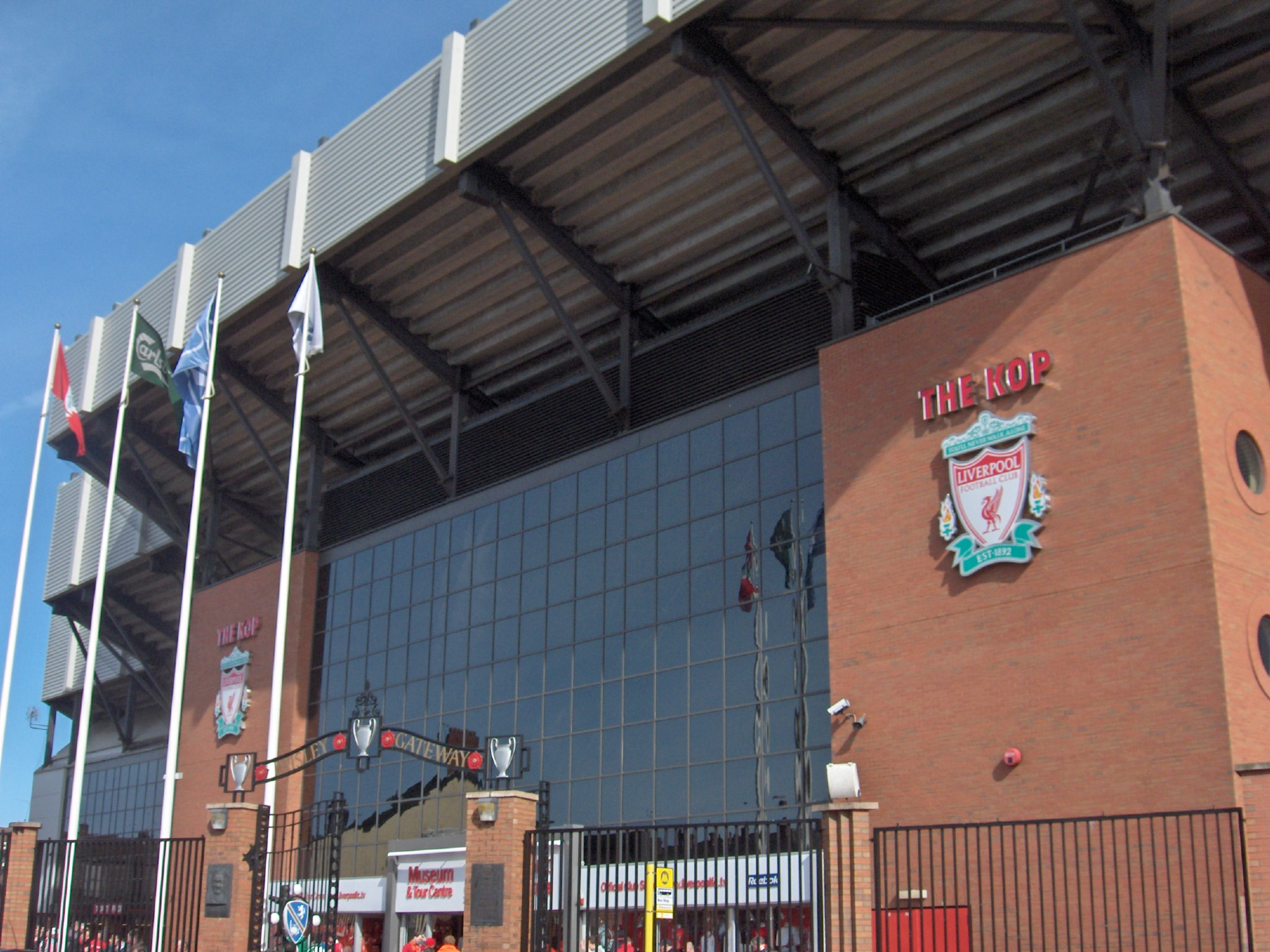 Le mythique "Kop of Anfield" - tribune accueillant les supporters les plus fervents du Liverpool FC - tel qu'on peut le voir en parcourant "Anfield Road", la rue qui mène au stade du même nom.